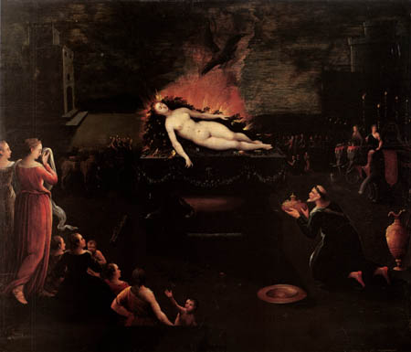 Die Apotheose der Semelelabel QS:Lde,"Die Apotheose der Semele"